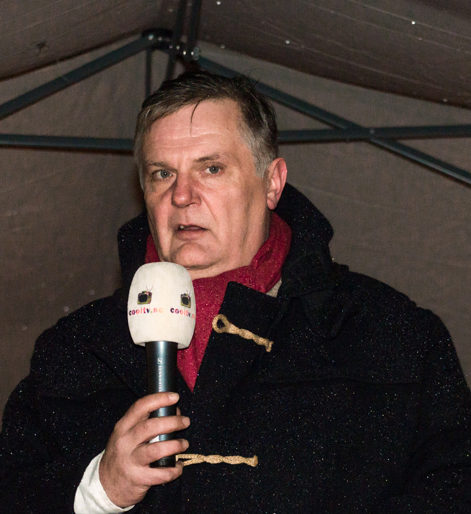 Johan Westerholm talar på Raoul Wallenbergs torg i Stockholm den 9 november 2019 till minne av Kristallnatten 1938. Arrangör: Vänskapsförbundet Sverige-Israel i Stockholm.